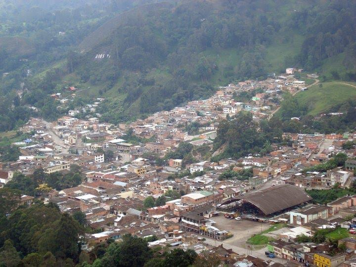 panorámica de Pacho Cundinamarca